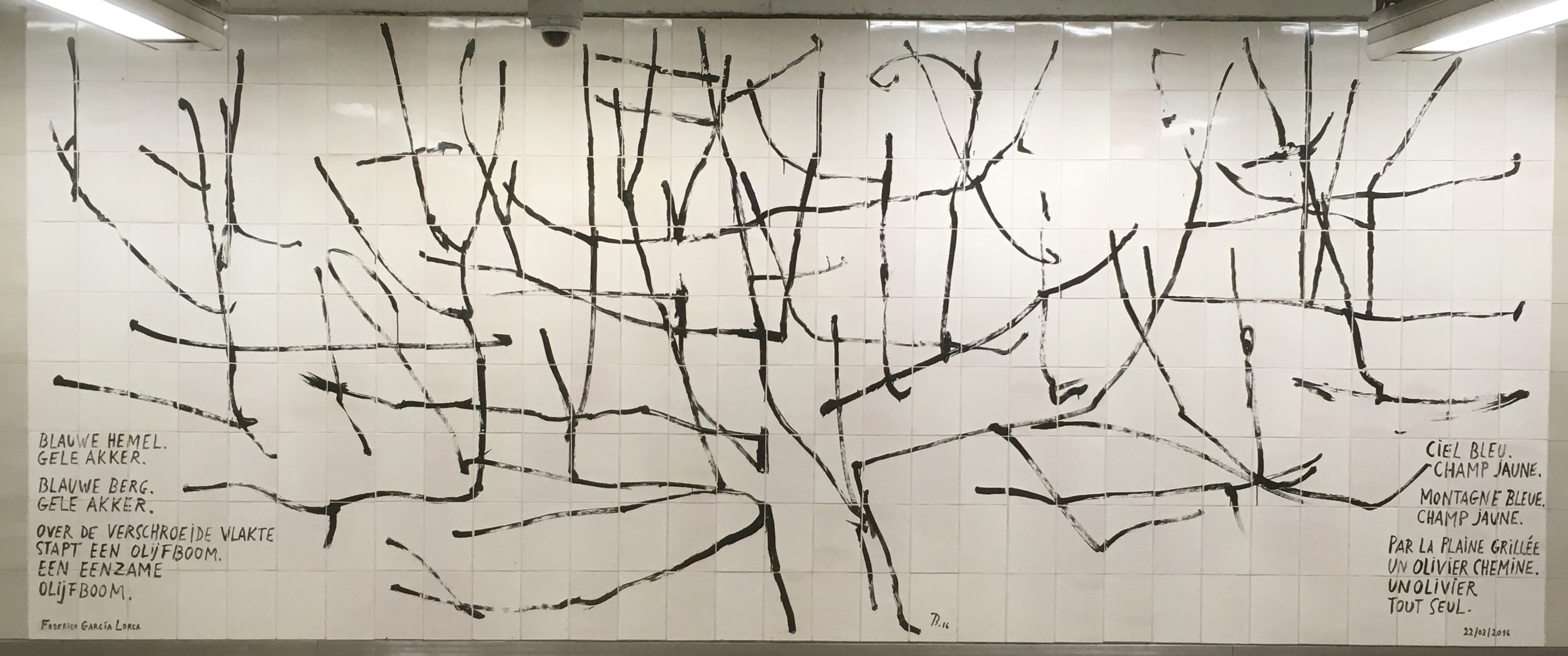 Gedenkwand von Benoît van Innis zum dritten Jahrestag des Terroranschlags vom 22. März 2016 in der U-Bahn-Station Maelbeek in Brüssel